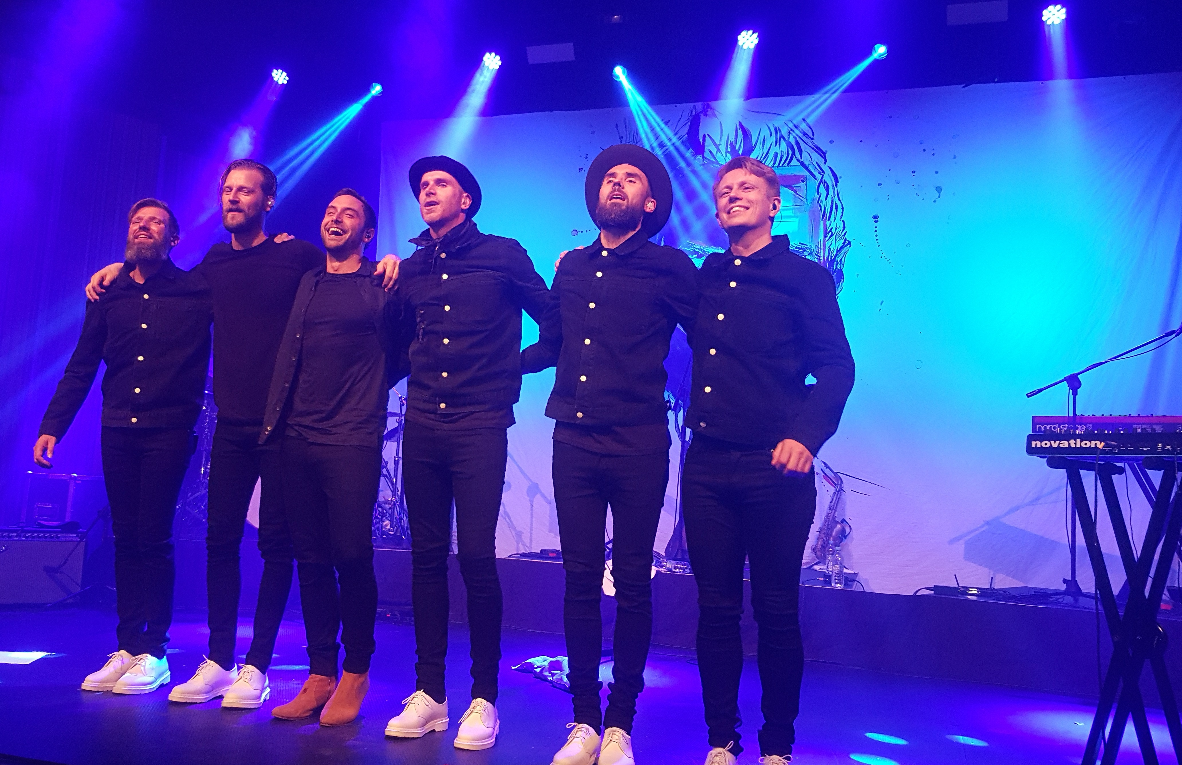 Szwedzki piosenkarz Måns Zelmerlöw i jego zespół na koncercie w gdańskim klubie Stary Maneż w październiku 2017 roku.